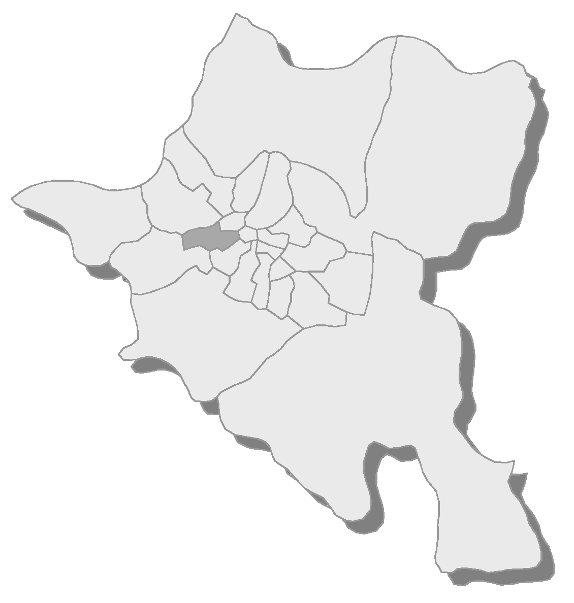 Sofia, municipality Krasna polyana